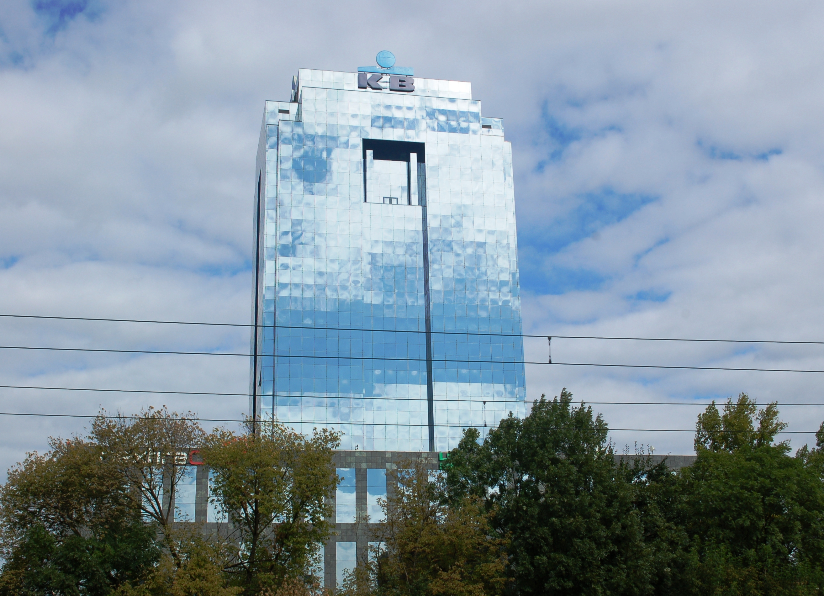 Warschau, Warta Tower